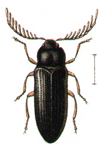 Cerophytum elateroides